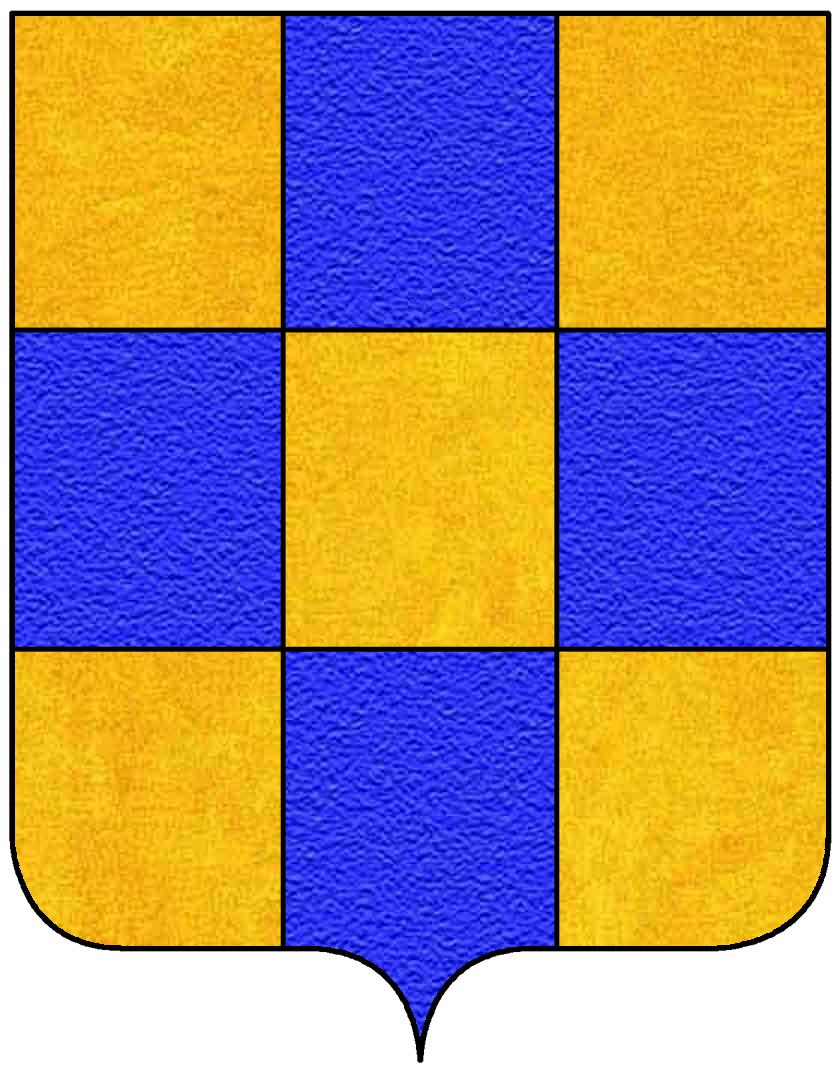 Stemma della famiglia Gentile